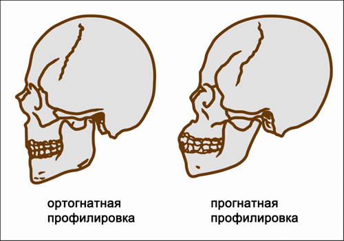 Варианты вертикальной профилировки лица: ортогнатная и прогнатная. На основе изображения из статьи Профилировка лица в БРЭ.